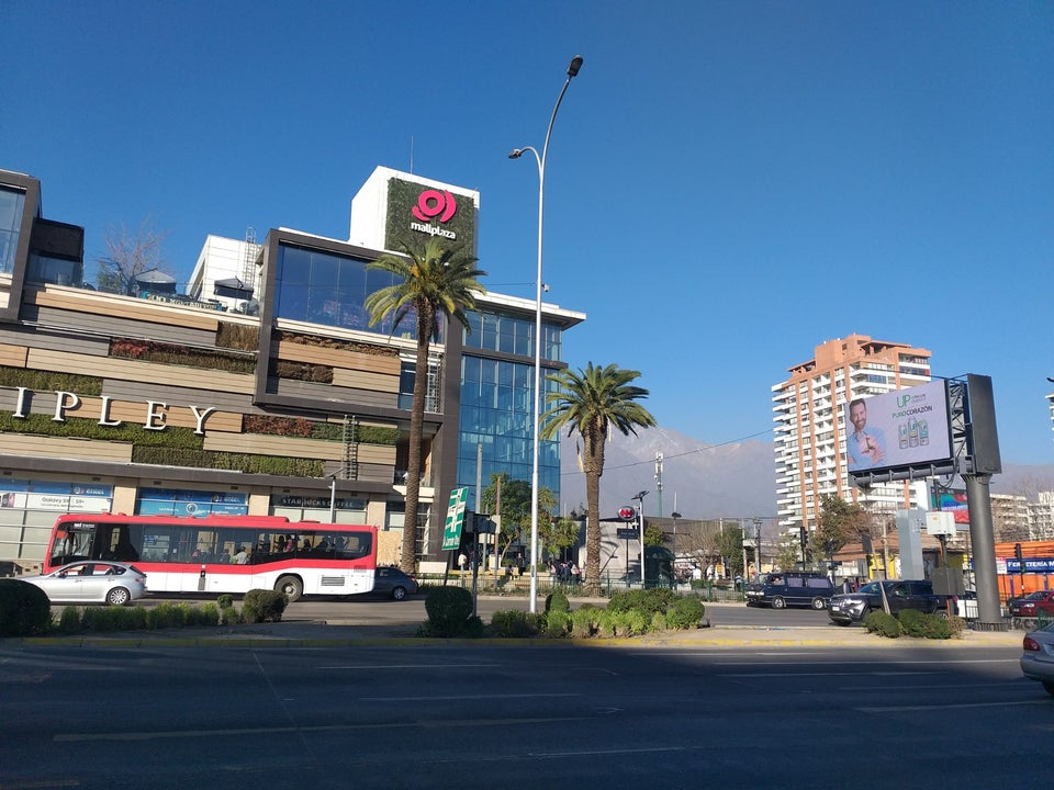 Mallplaza Egaña